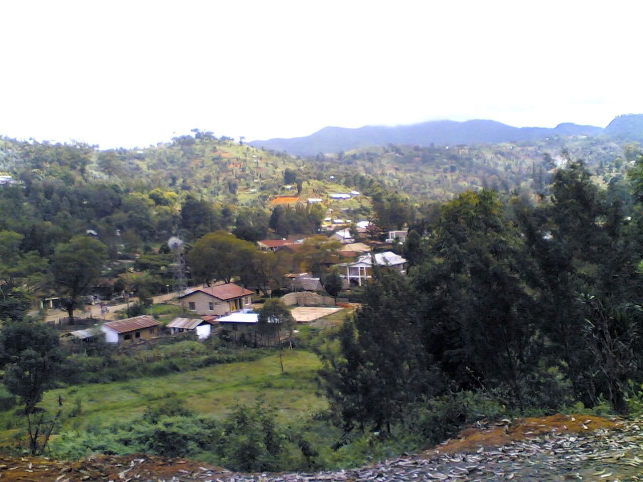 Lushoto in Tanga Region, Tanzania.